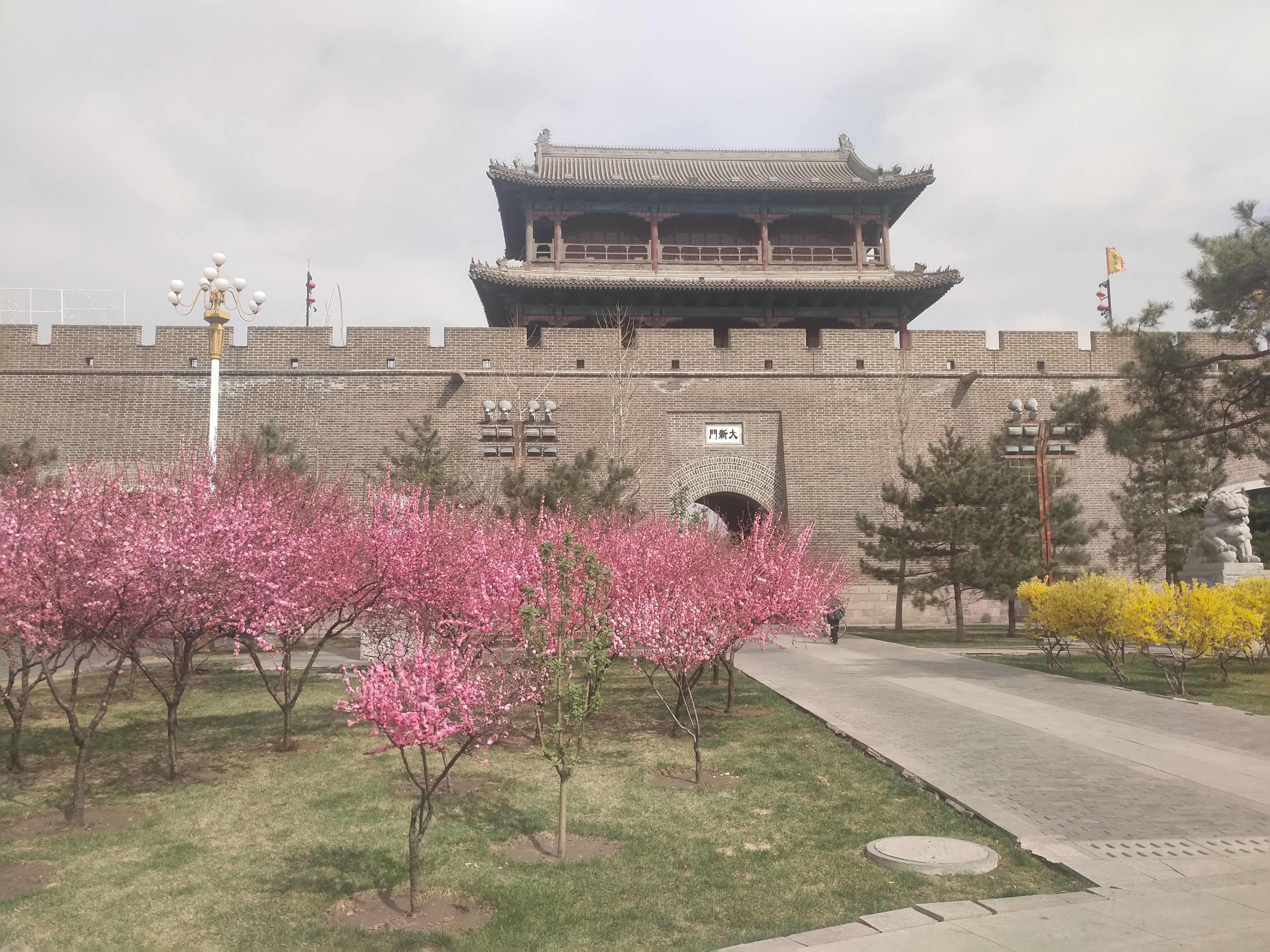 宣化大新门（西城门）